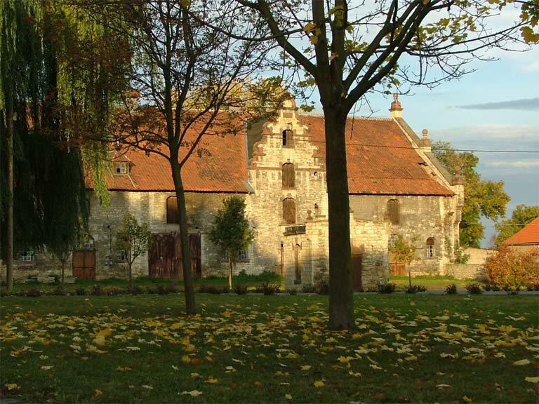 Burg Krottorf im Ortsteil Krottorf von Gröningen in Sachsen-Anhalt